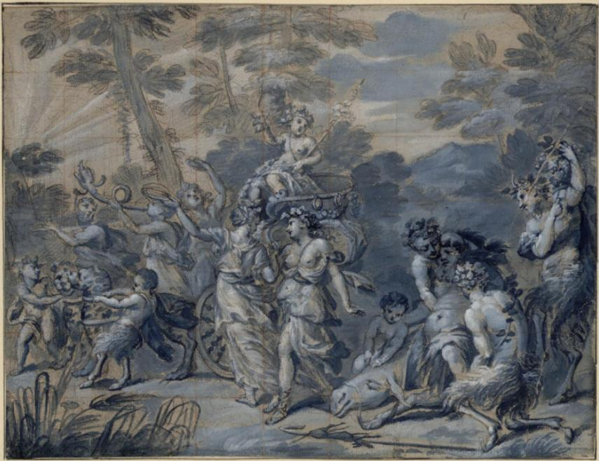 Dessin préparatoire pour le Triomphe de Bacchus, Bon Boullogne ou son frère. Musée Albertina, Vienne (Autriche).